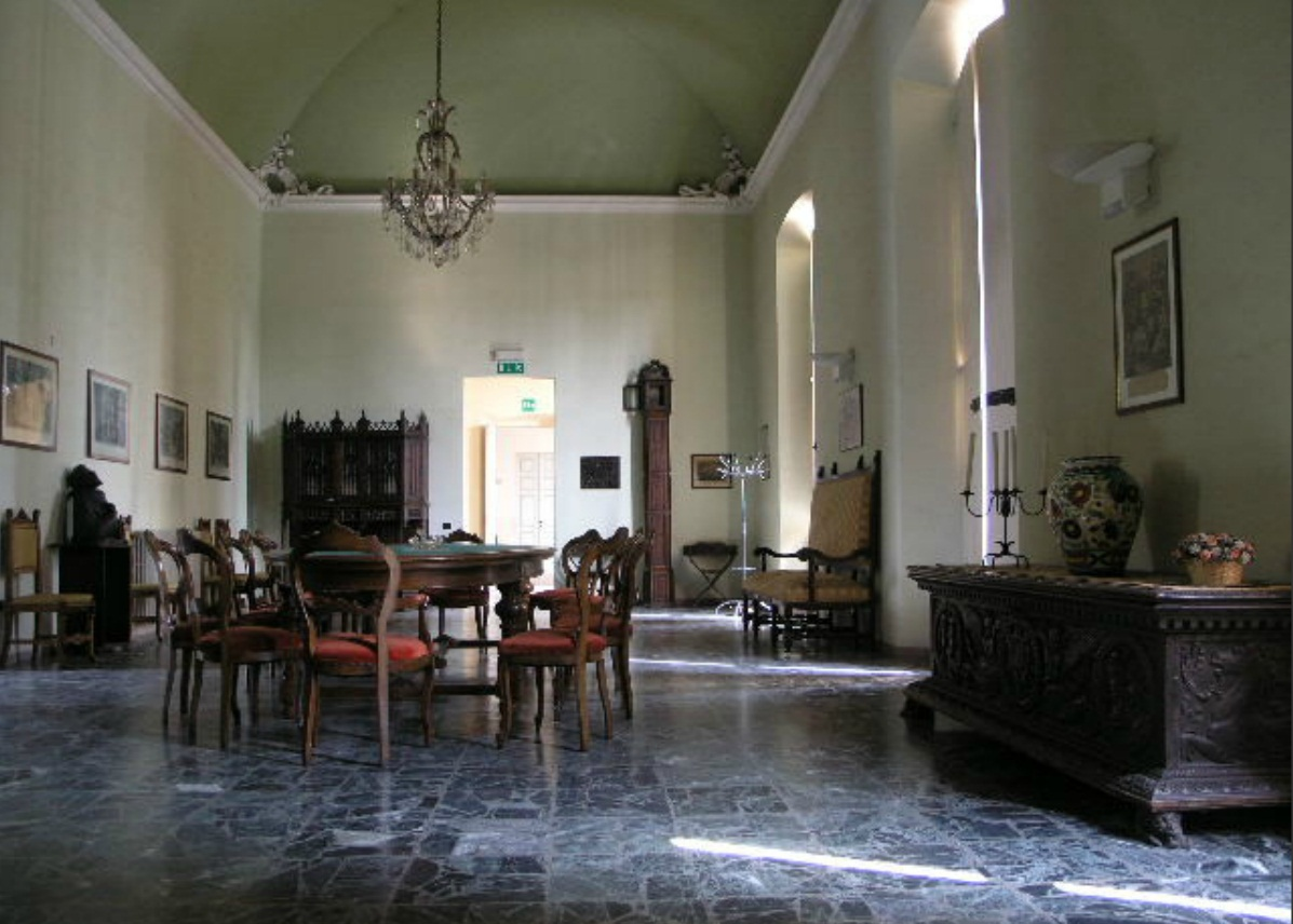 Interno del palazzo Brentano di Corbetta (MI) - Italia